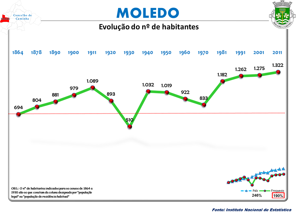 Censos 1864/2011